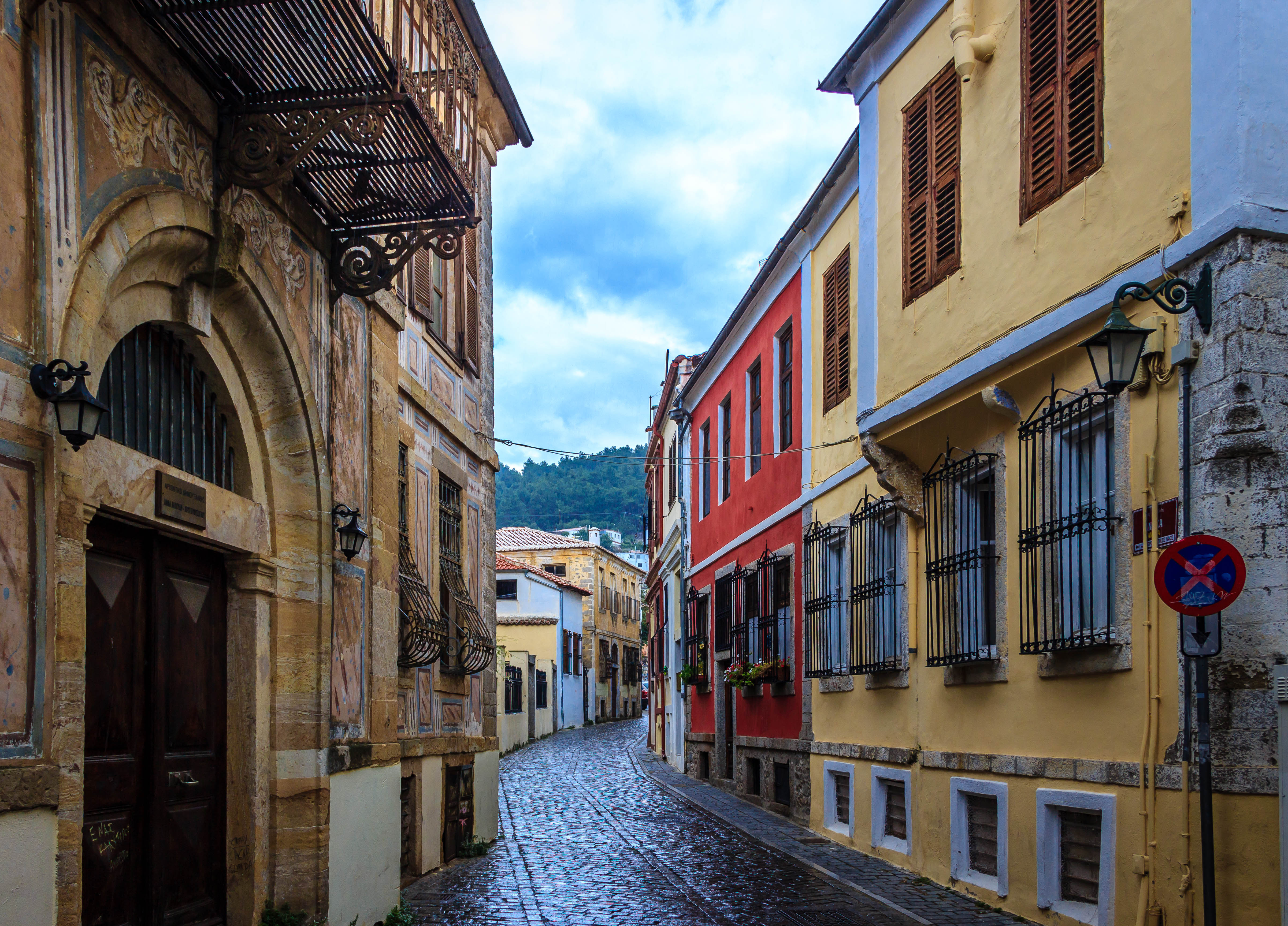 Παλαιά Πόλη Ξάνθης«Παλαιά Πόλη Ξάνθης»